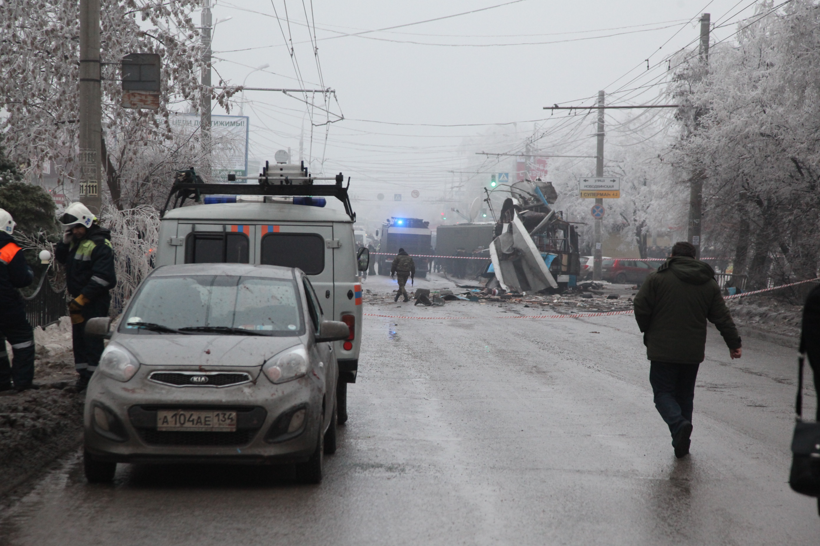 Троллейбус после теракта в Волгограде